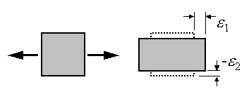 Dehnungs-Dehnungs-Kopplung bzw. Querkontraktions-Kopplung